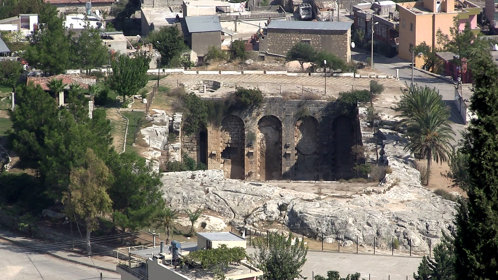 Byzantinische Zisterne in Silifke, Südtürkei